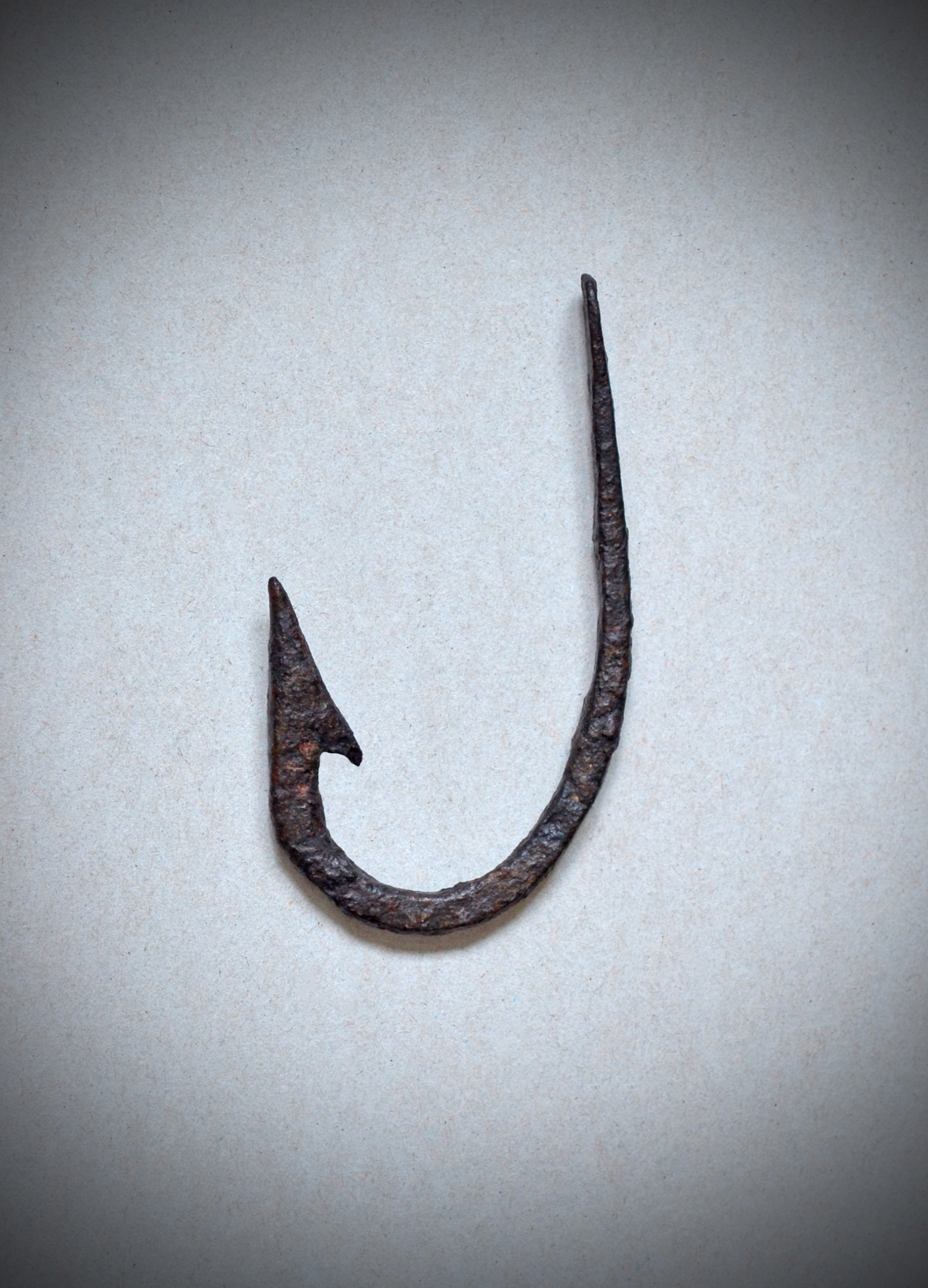 Рыболовный крючок с головкой в форме лопатки.Древняя Русь,Рязанское княжество,13 век.